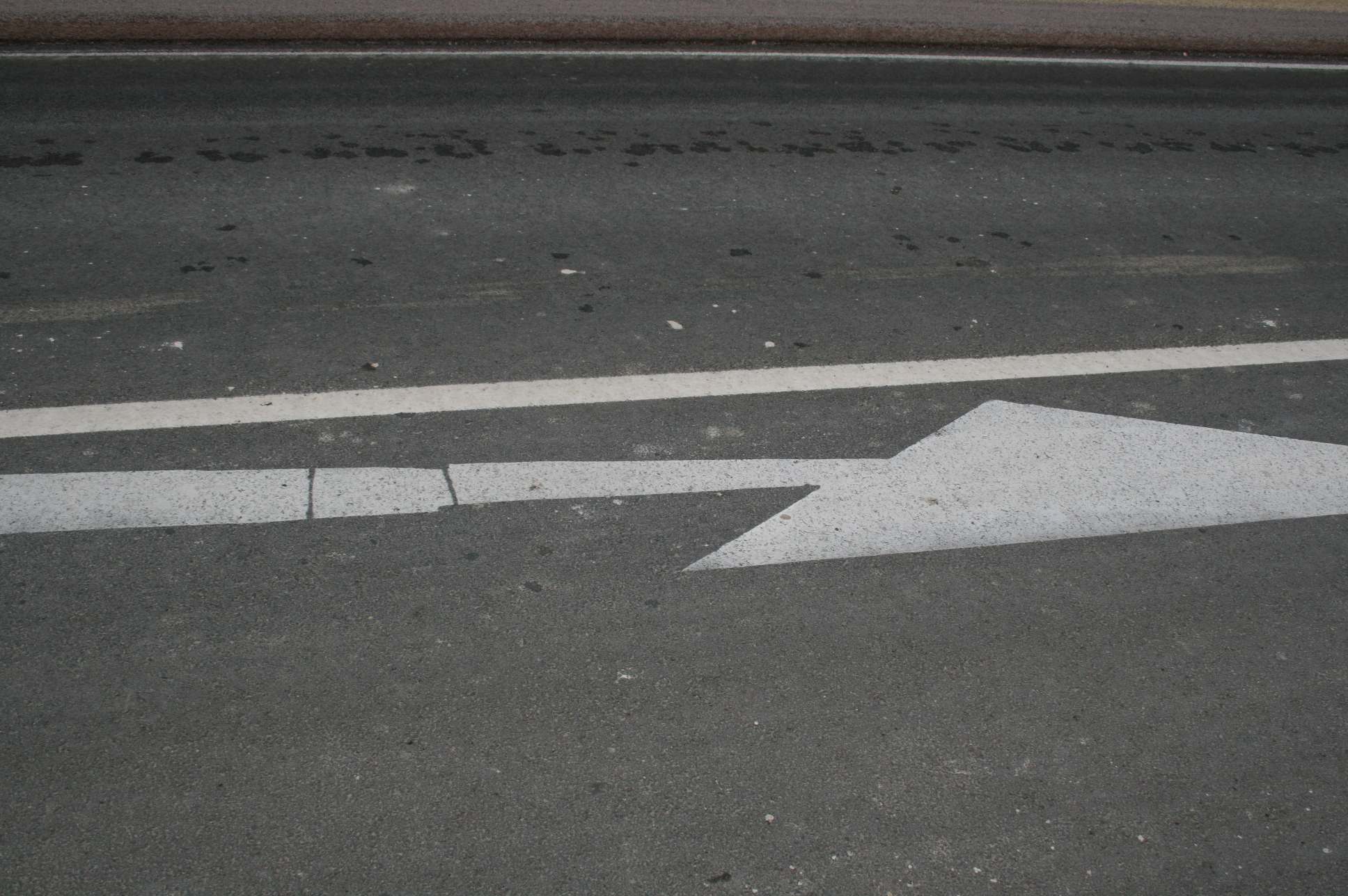 Flèche de rabattement en France